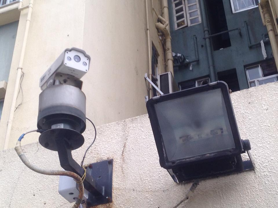 CCTV of Tai On Building